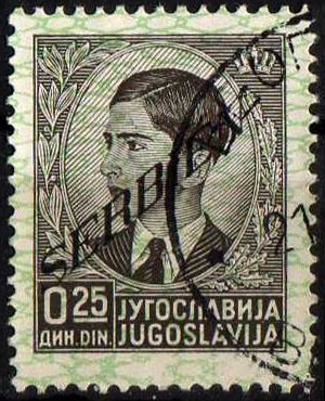 Почтовая марка Сербии под немецкой военной администрацией. Надпечатка на марке Югославии 1939 года.